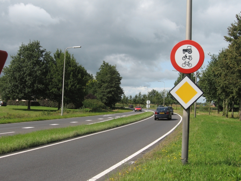 Provinciale weg 343 bij Oldenzaal